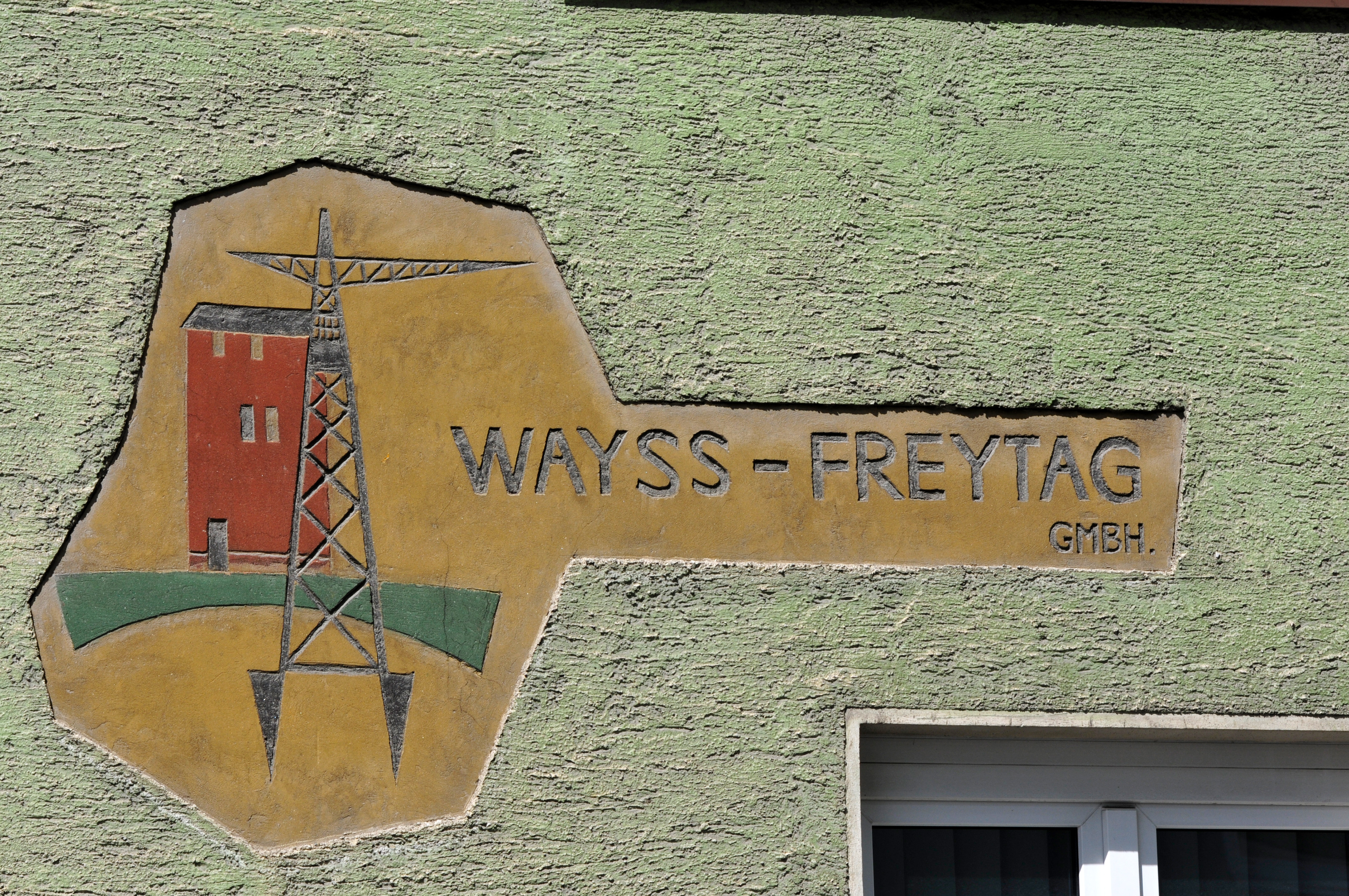 Innsbruck Im Rahmen des Fußballländerspiels Österreich gegen Rumänien bin ich einige Stunden durch Innsbruck gefahren und habe Aufnahmen gemacht, die vielleicht mal gebraucht werden könnten. --Ralf Roleček 11:20, 10 June 2012 (UTC) The making of this work was supported by Wikimedia Austria. For other files made with the support of Wikimedia Austria, please see the category Supported by Wikimedia Österreich.